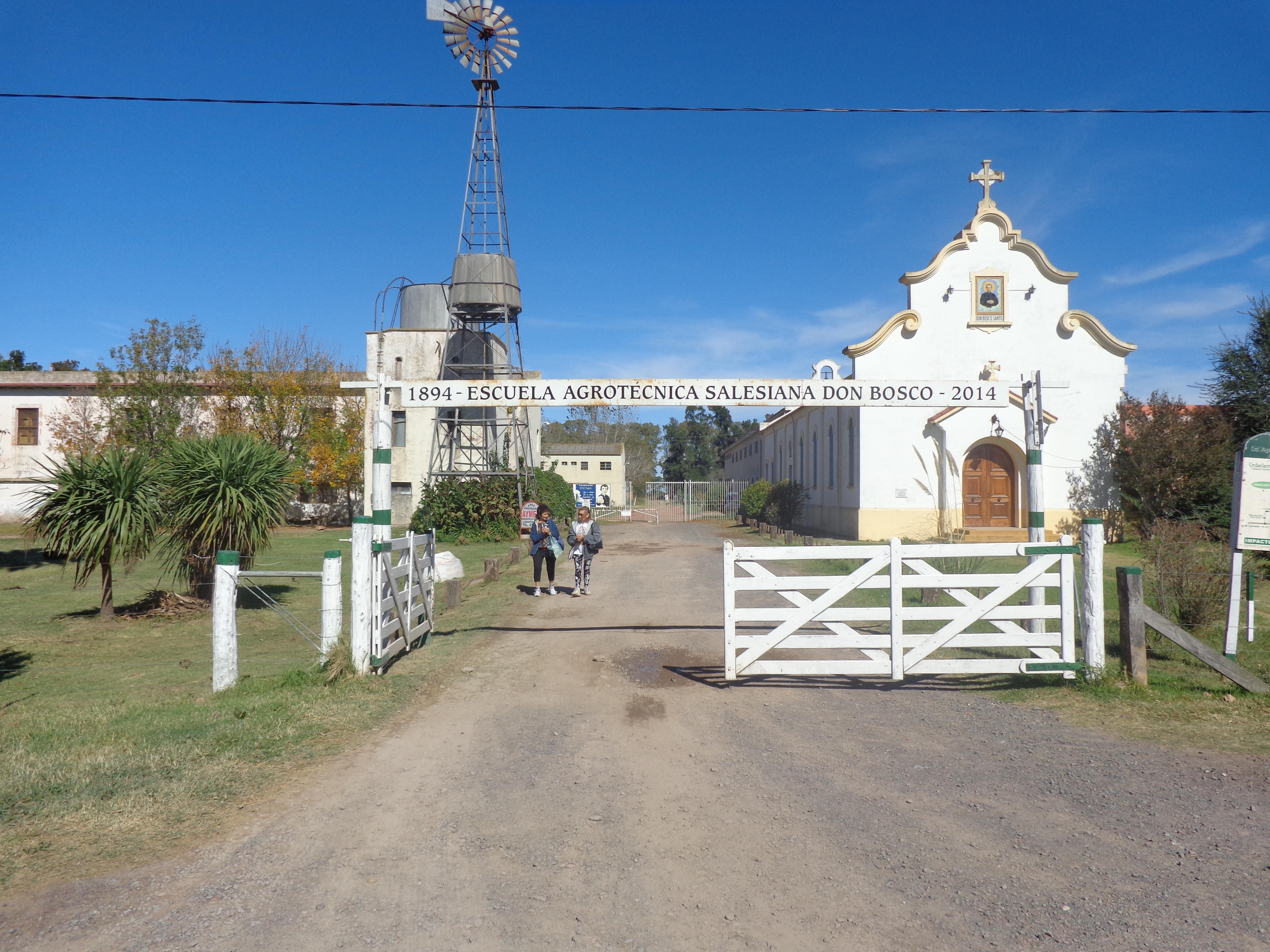 EAS, Escuela Agrotécnica Salesiana Don Bosco, en Uribelarrea, Partido de Cañuelas, Provincia de Buenos Aires, Argentina. Cuenta con una capilla y fue la primera escuela de Latinoamérica destinada a la enseñanza de jóvenes en tareas rurales.